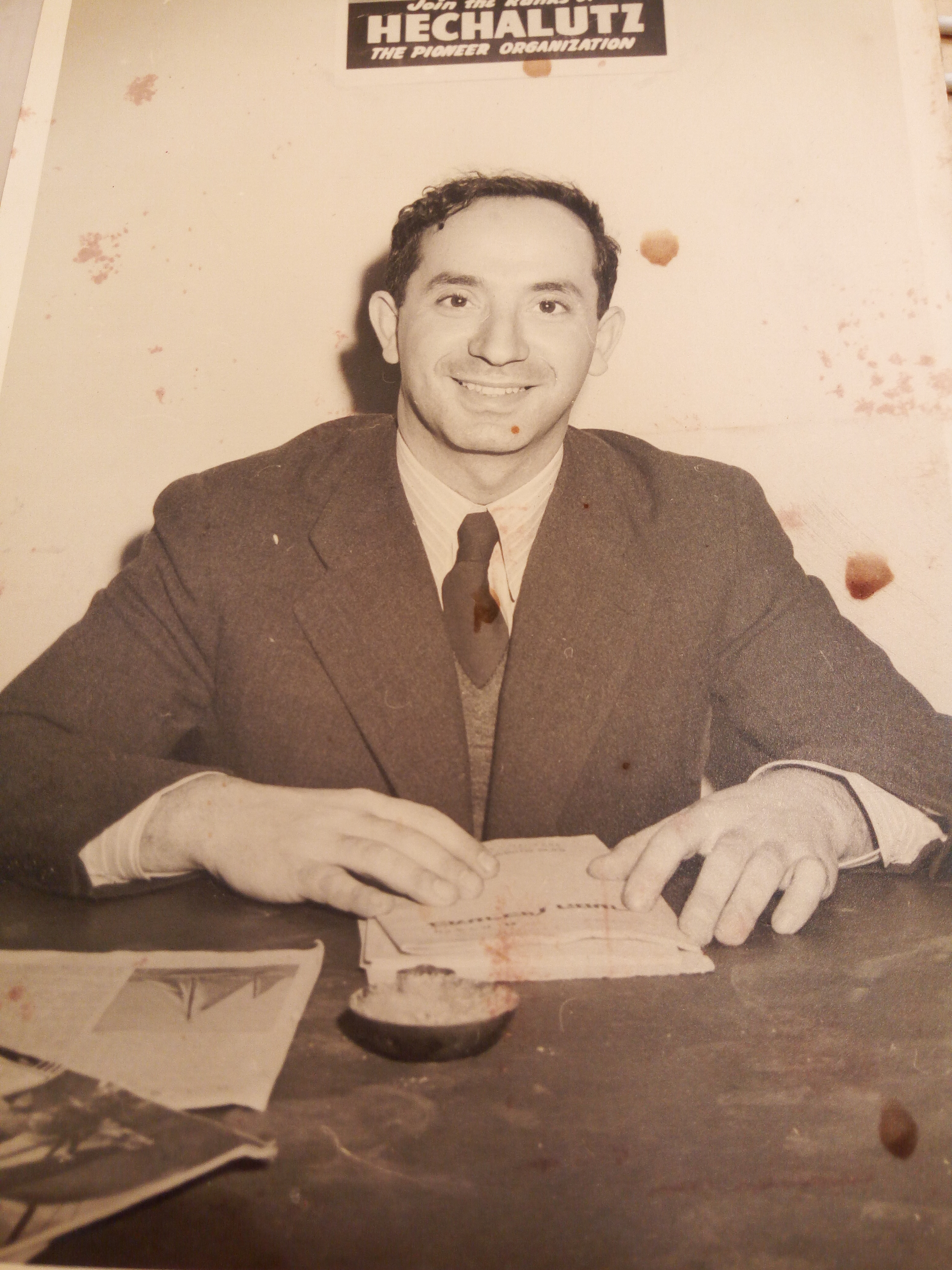 יונה יגול במזכירות החלוץ 1947